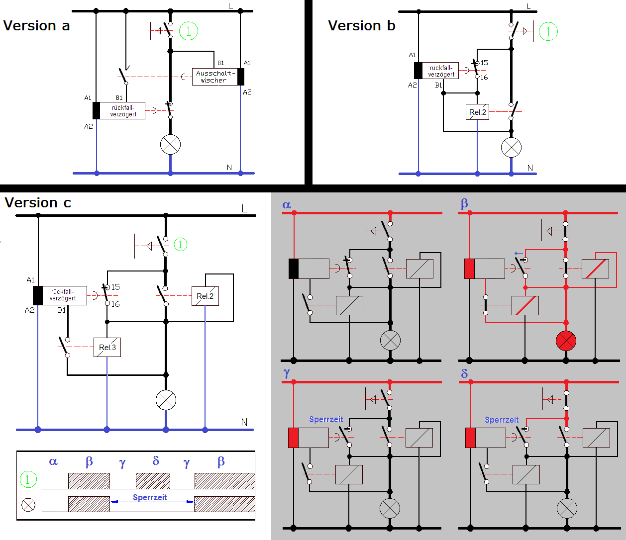 Relaisschaltungen zur Verhinderung zu schneller Schaltfolgen